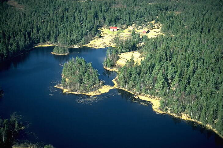 Torpet Holmen vid Lilla Holmevattnet. Bilden täcker inga fornlämningar. Motiv: Bredfjället Nyckelord: Flygbilder, Riksintressen Kategori: Insjömiljöer, Torp Torpet Holmen vid Lilla Holmevattnet. Bilden täcker inga fornlämningar.